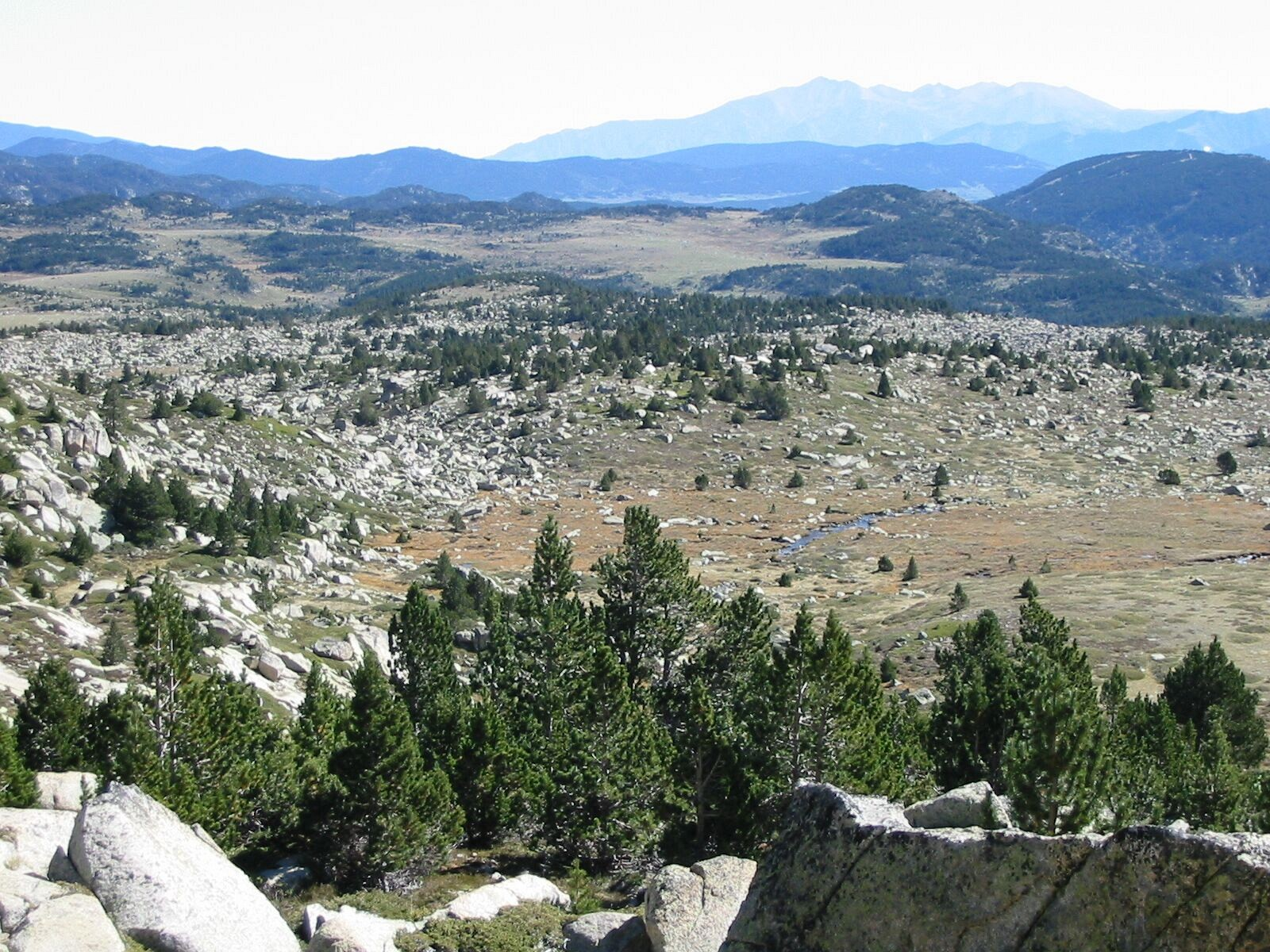 Désert du Carlit, le Canigou au loin, Angoustrine, Pyrénées-Orientales, France